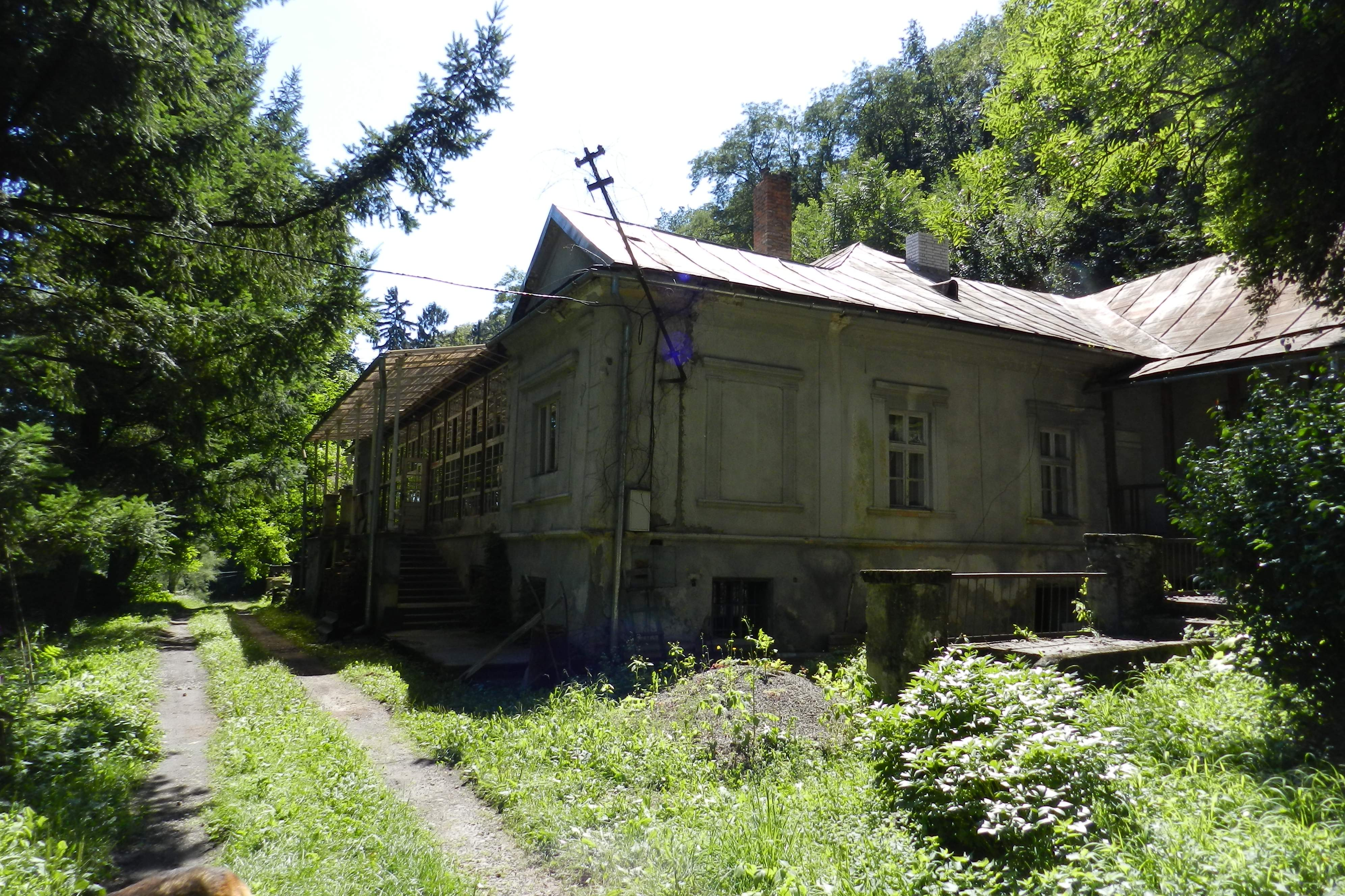 с. Чертеж, Ужгородський район, Закарпатська обл. Маєток губернатора Підкарпатської Русі Костянтина Грабаря